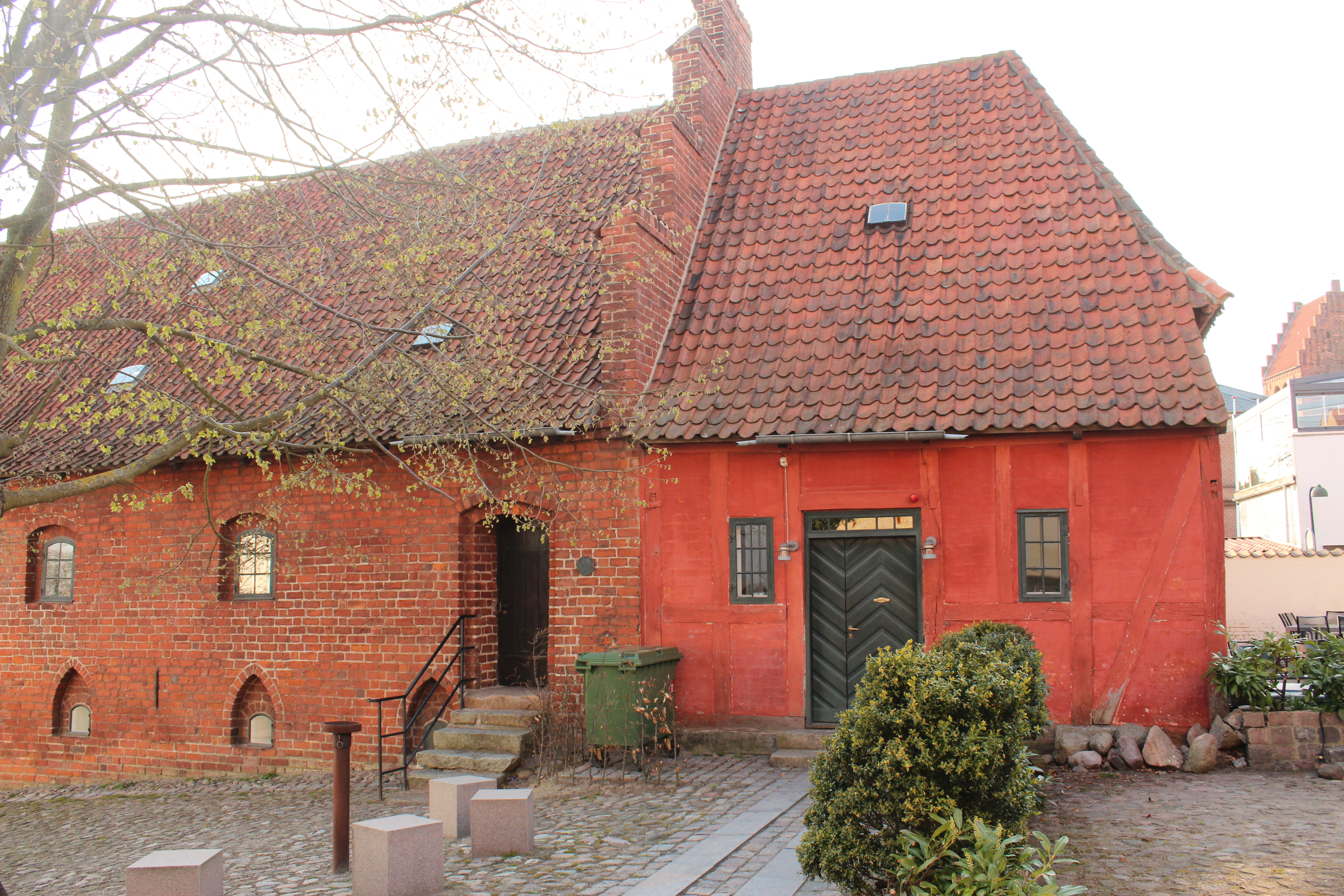 Bygningen er dendrokonorlogisk dateret til 1739.